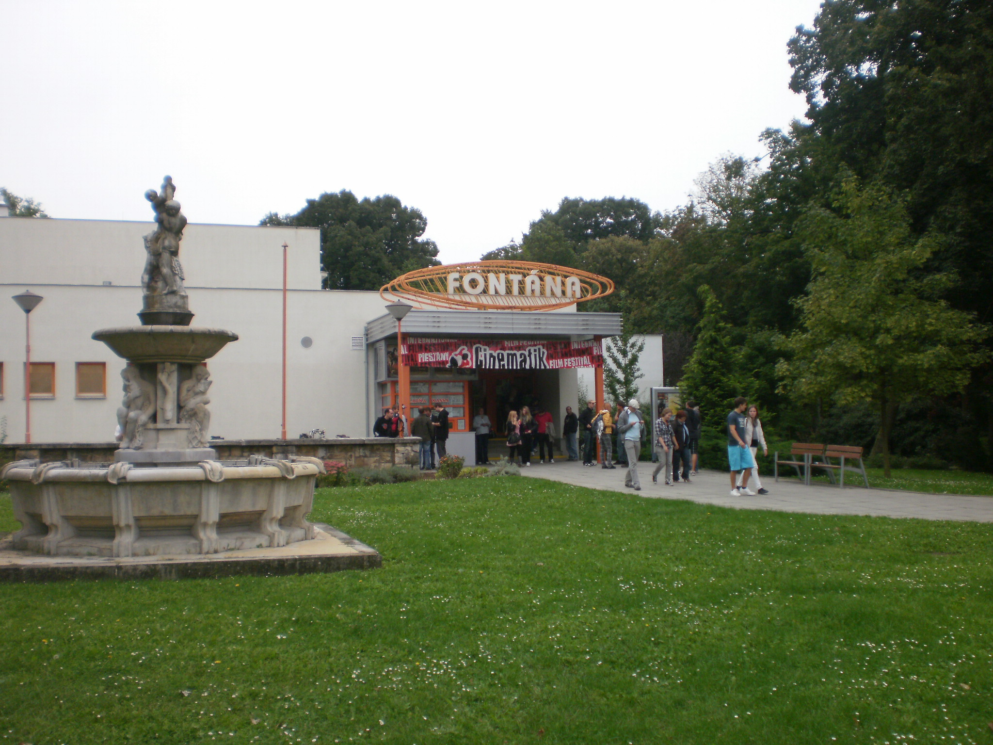 Kino Fontána, jedno z dejísk Filmového festivalu Cinematik.